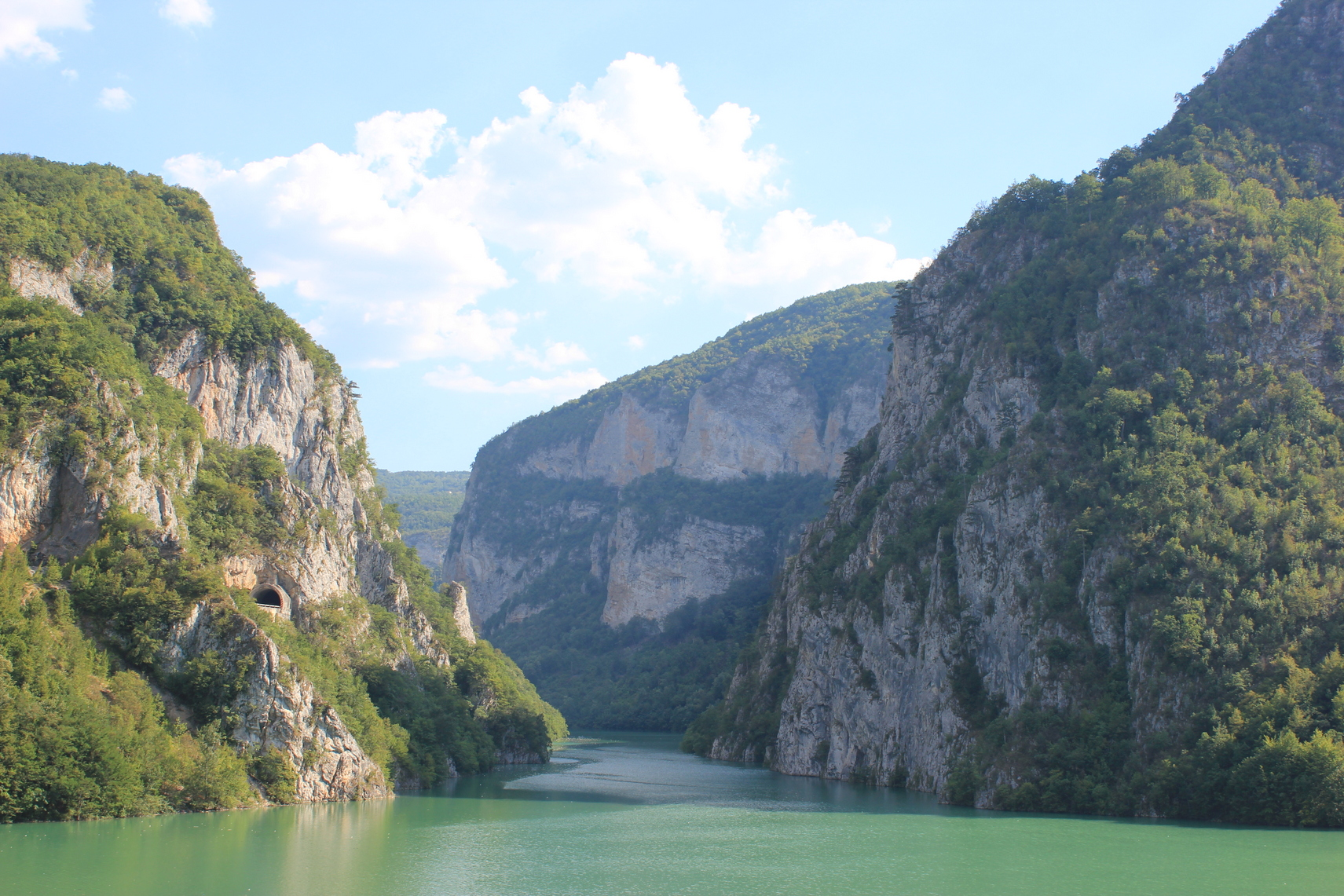 Die Mündung des Lim in die Drina südlich von Višegrad, Ostbosnien.Hornjoserbsce: Wuliw rěki Lim do Driny južnje Višegrada we wuchodnej Bosniskej.